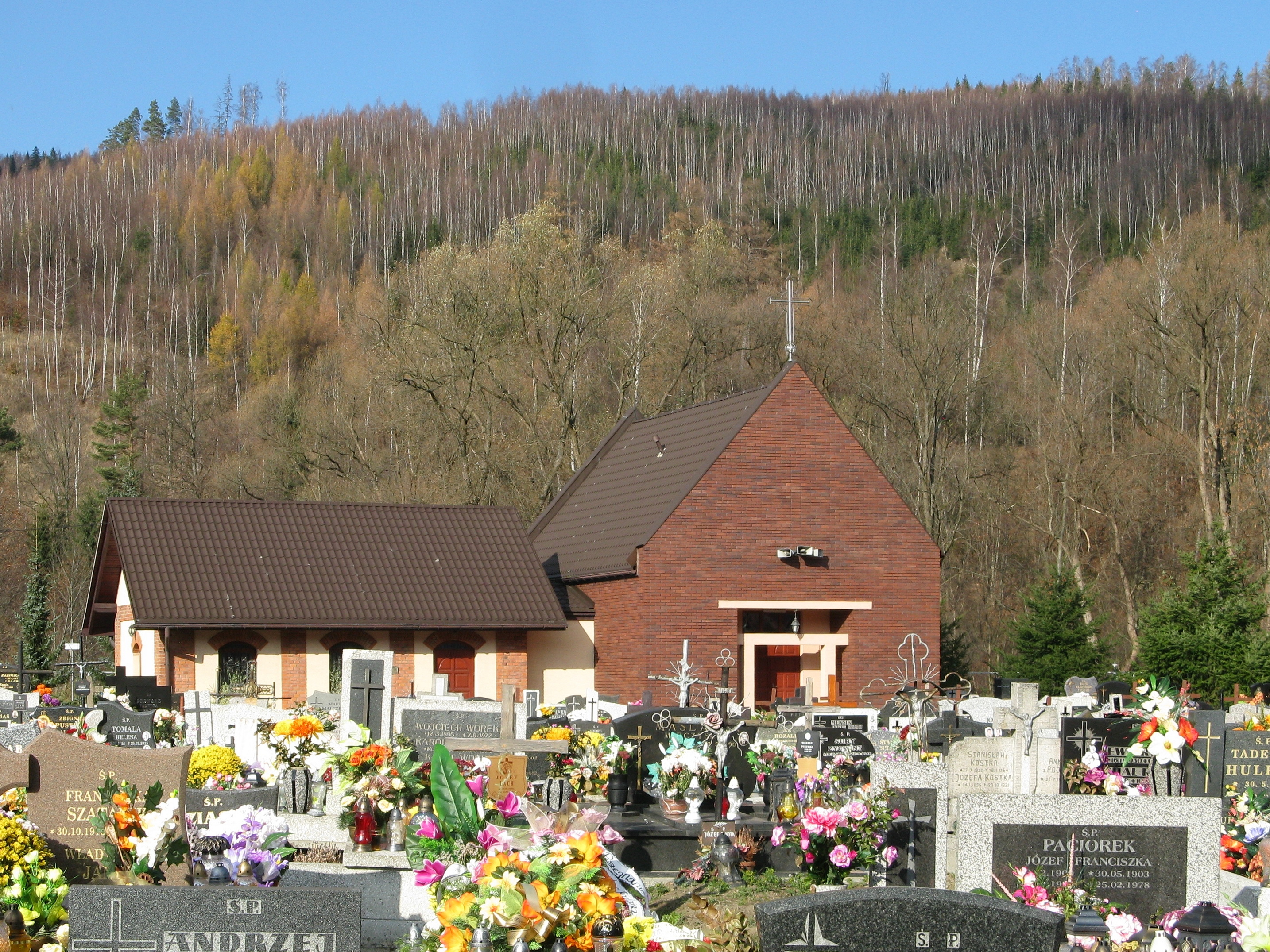 Kaplica cmentarna i kostnica na cmentarzu w Rajczy, w tle Biernatka.